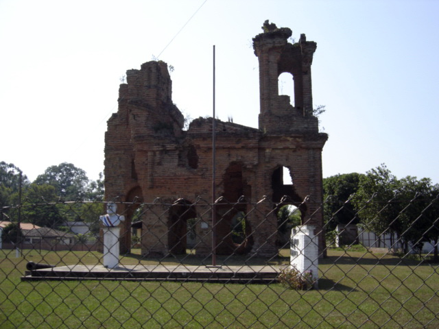 Ruinas de Humaitá, símbolo de la resistencia paraguaya